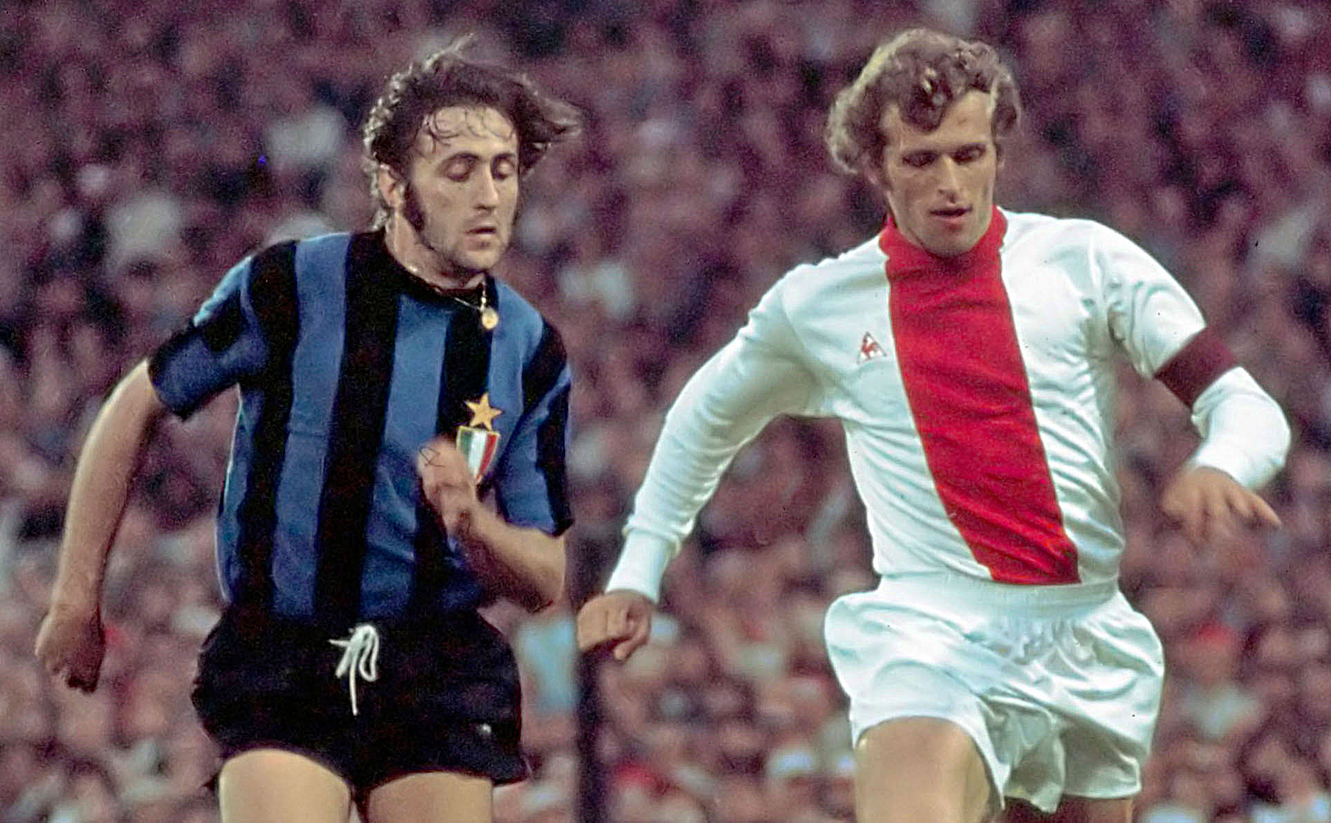 Rotterdam, 31 mei 1972, finale Europacup I in Feijenoord stadion: AFC Ajax tegen FC Internazionale Milano 2-0; Mauro Bellugi (links) en Piet Keizer (rechts) in aktie.